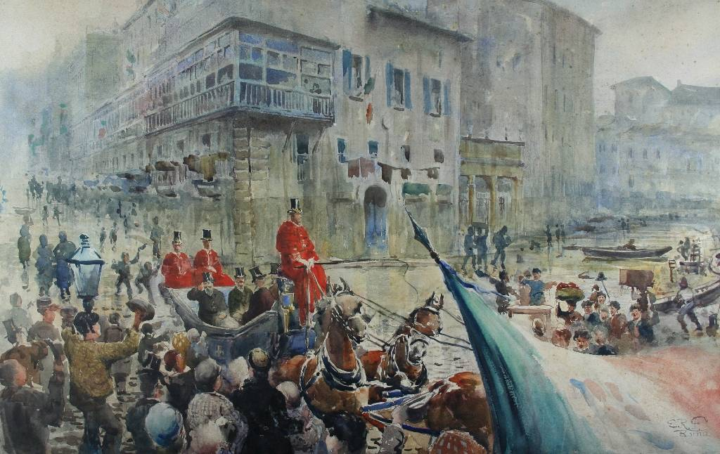 Re Vittorio Emanuele II di Savoia nella sua prima visita a Roma il 31 dicembre 1870